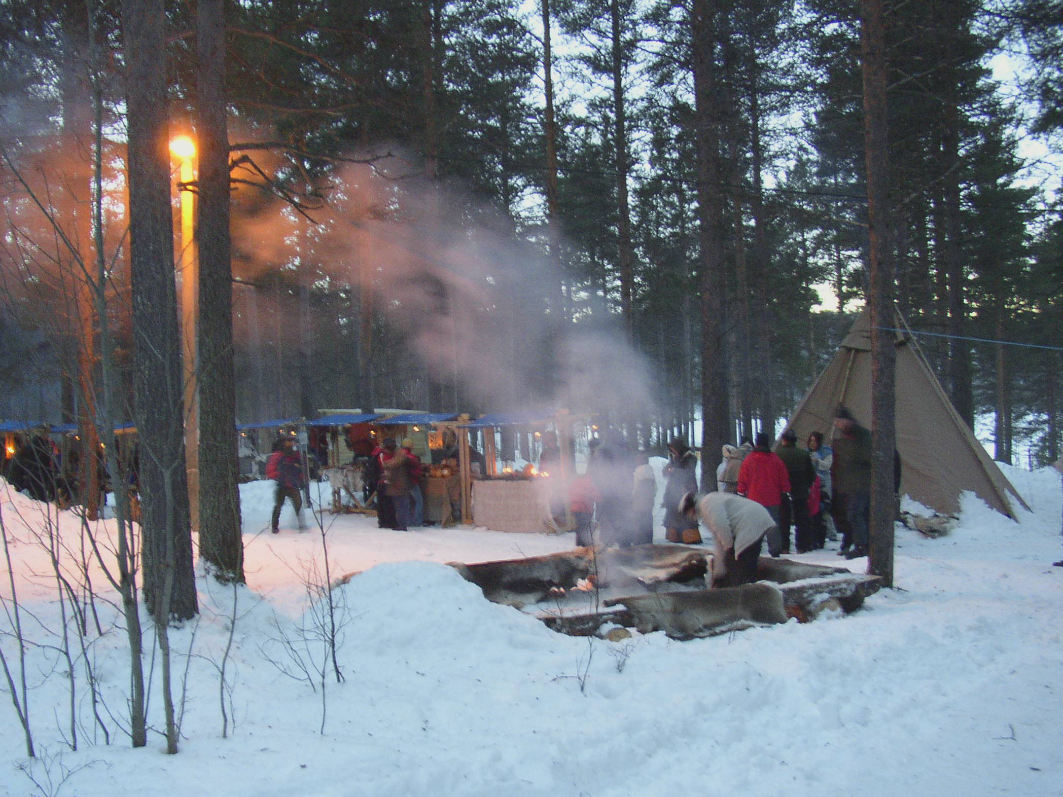 Historischer Markt beim Jokkmokksmarkt 2005